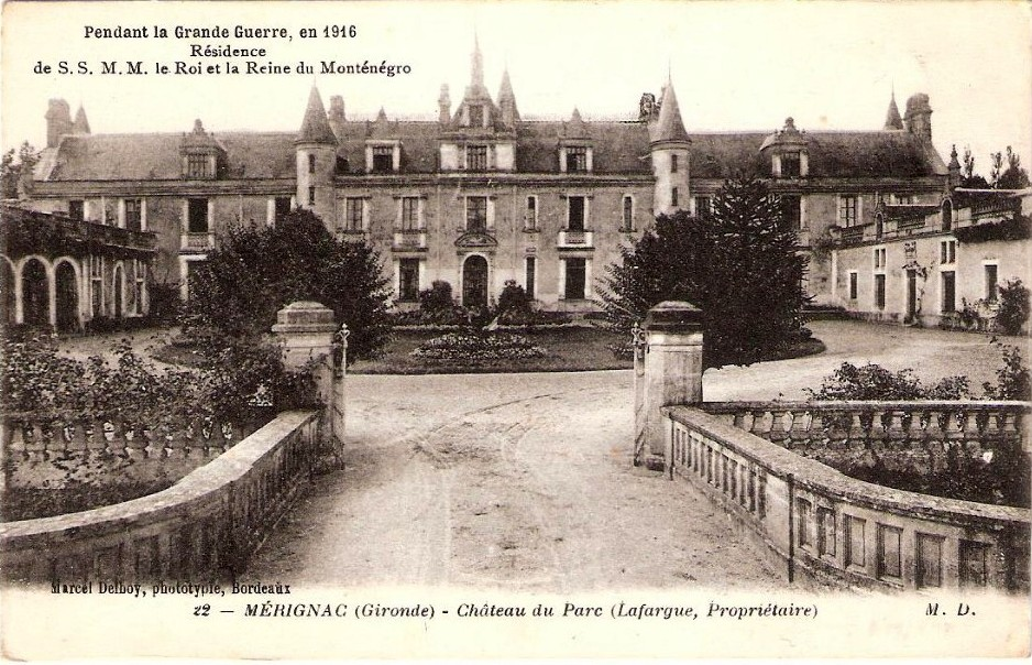 Mérignac on post-cards